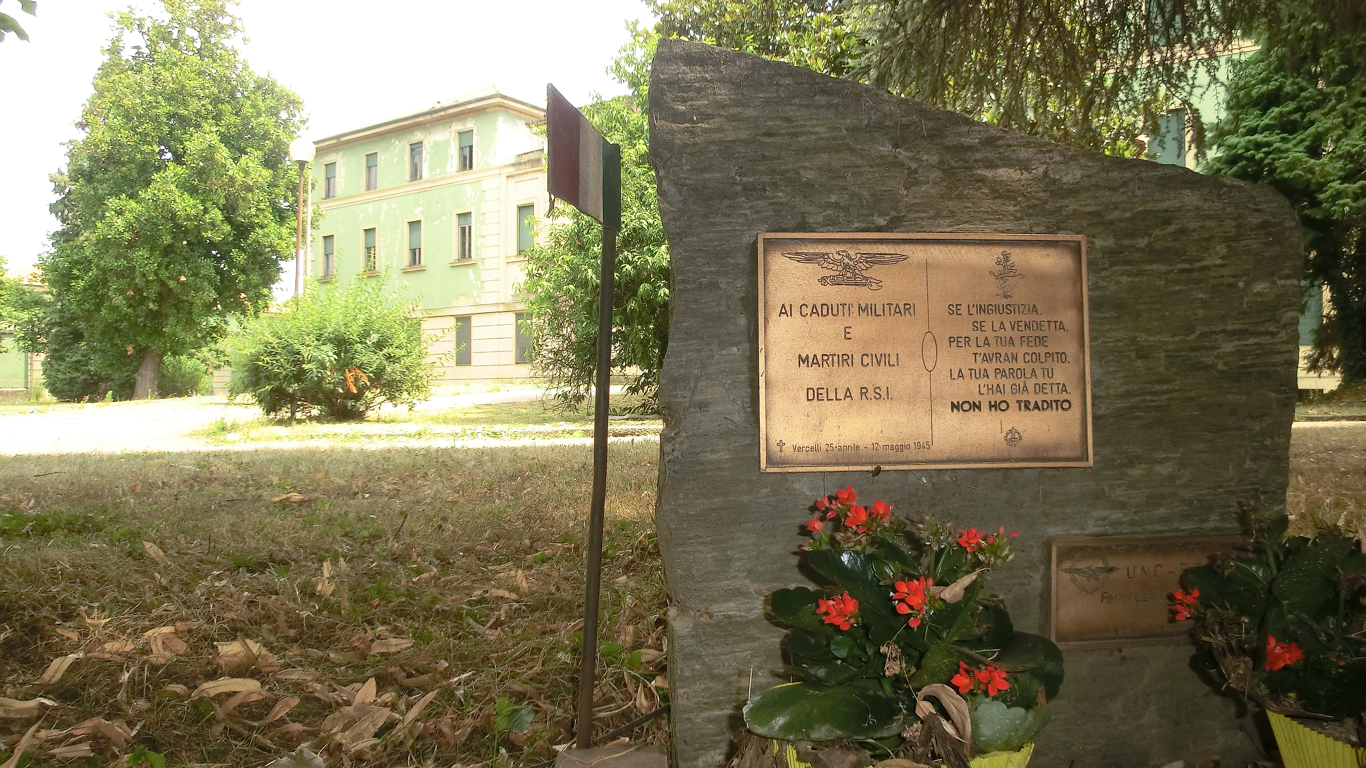 Il cippo presso l'ex ospedale psichiatrico di Vercelli